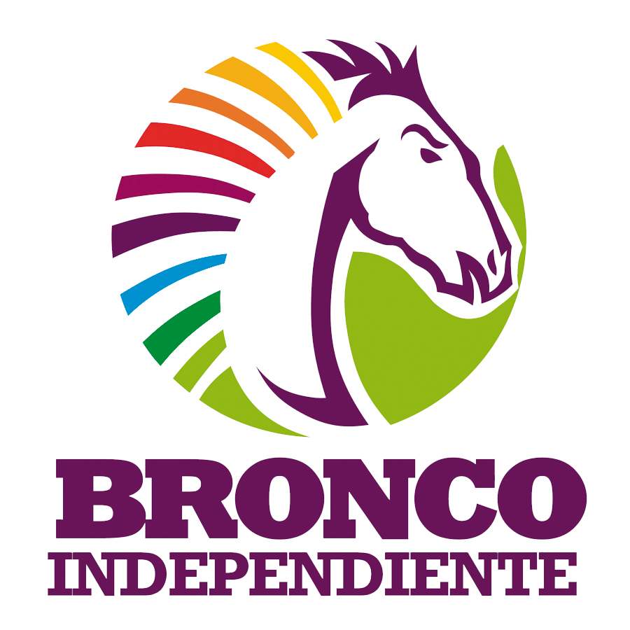 LOGO BRONCO INDEPENDIENTE